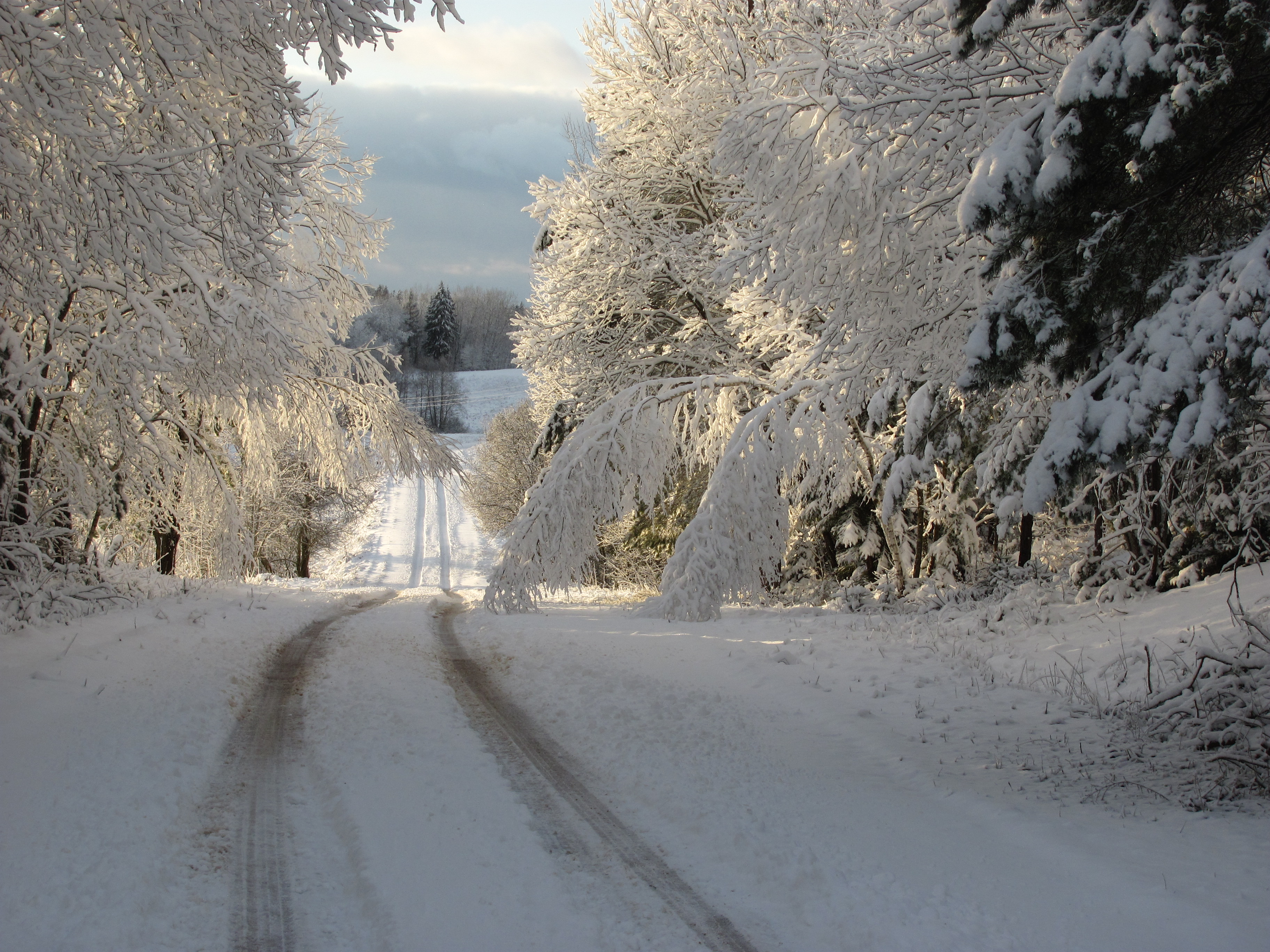 Zarasų sen., Lithuania